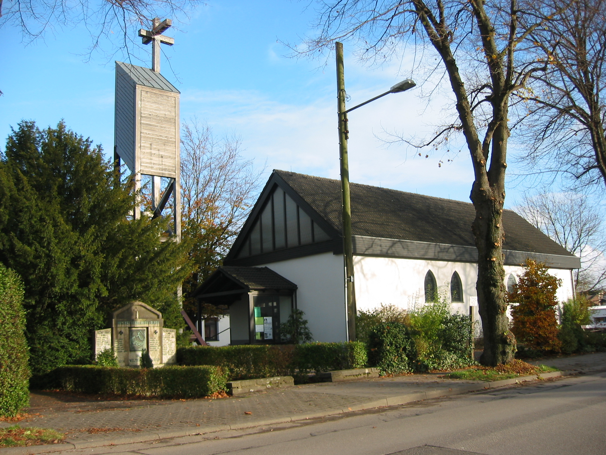 Kirche in Lichtenbusch, Deutschland